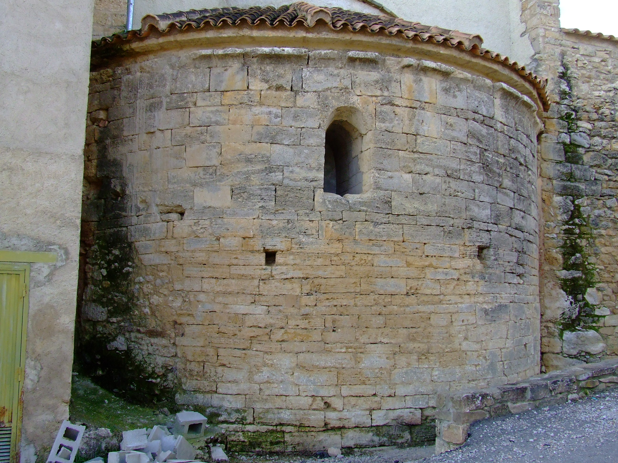 Absis de Sant Miquel de Conques (Conques, Isona i Conca Dellà, Pallars Jussà)